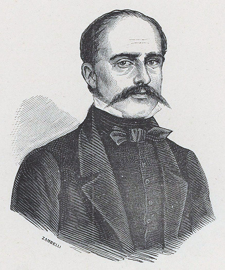 Ritratto di Francesco Arese Lucini